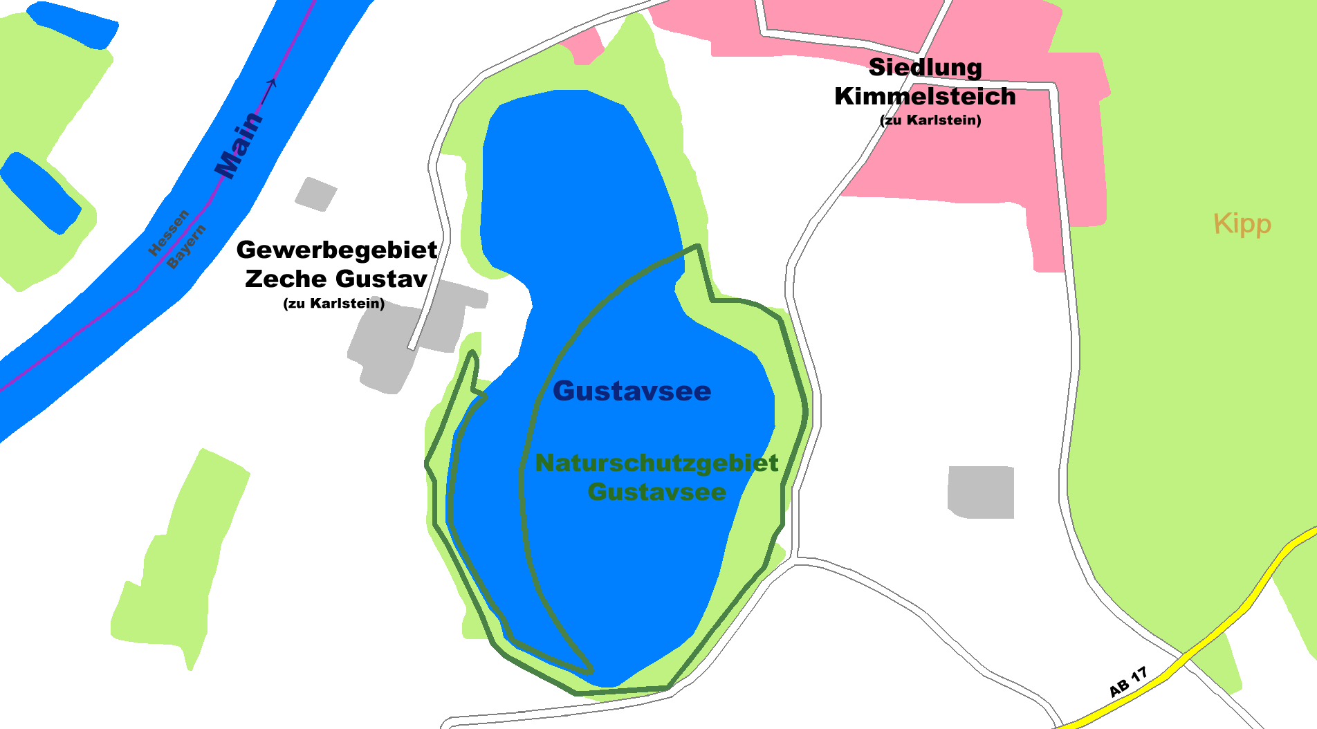 Der Gustavsee Grünfläche, Wiesen Siedlungsfläche Industriefläche Wald Gewässer Hauptstraße Naturschutzgebietsgrenze Landesgrenze